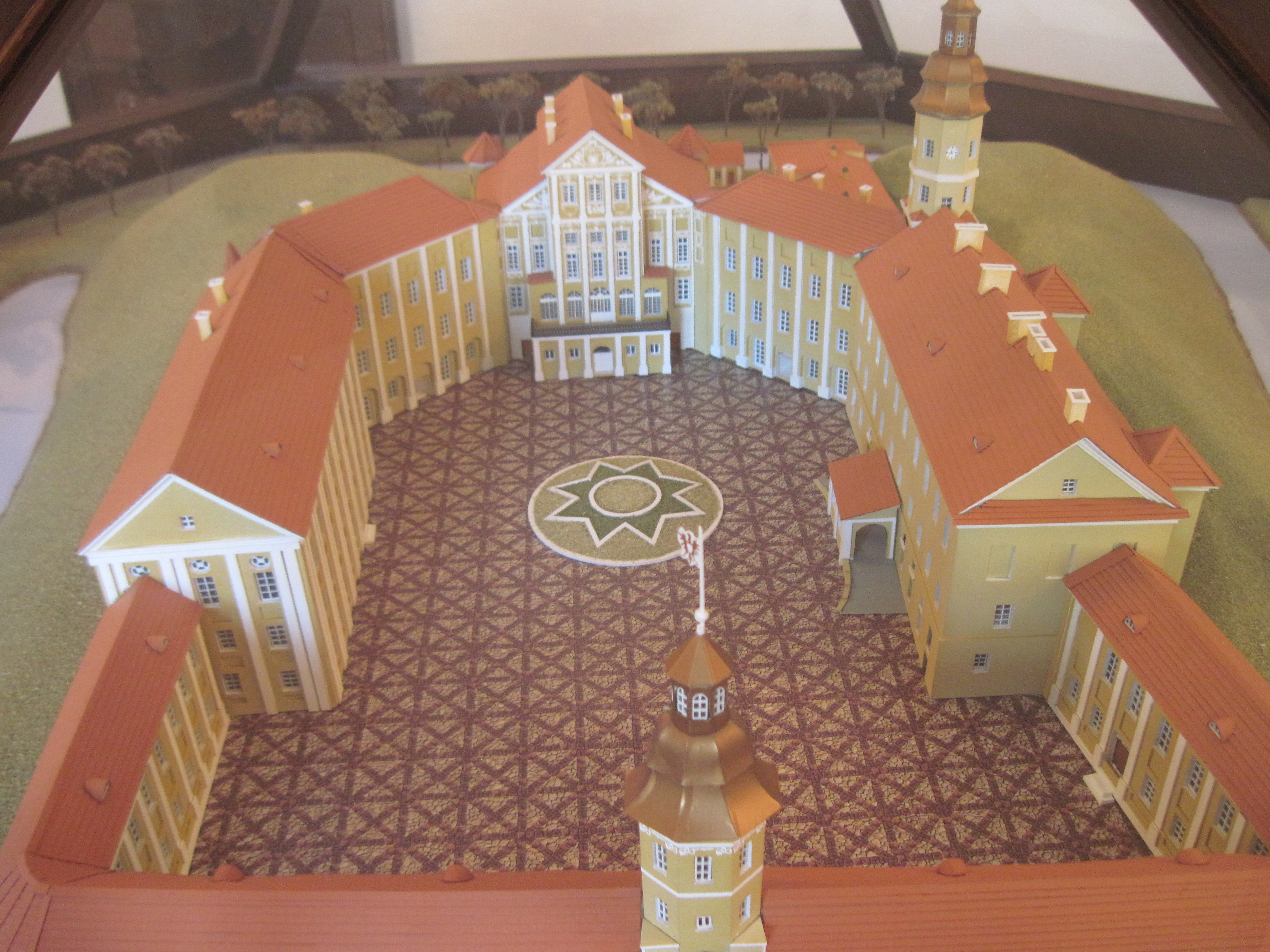 Унутраны выгляд замку пры Радзівіле Рыбаньцы. Макет. Нясвіжскі палац.